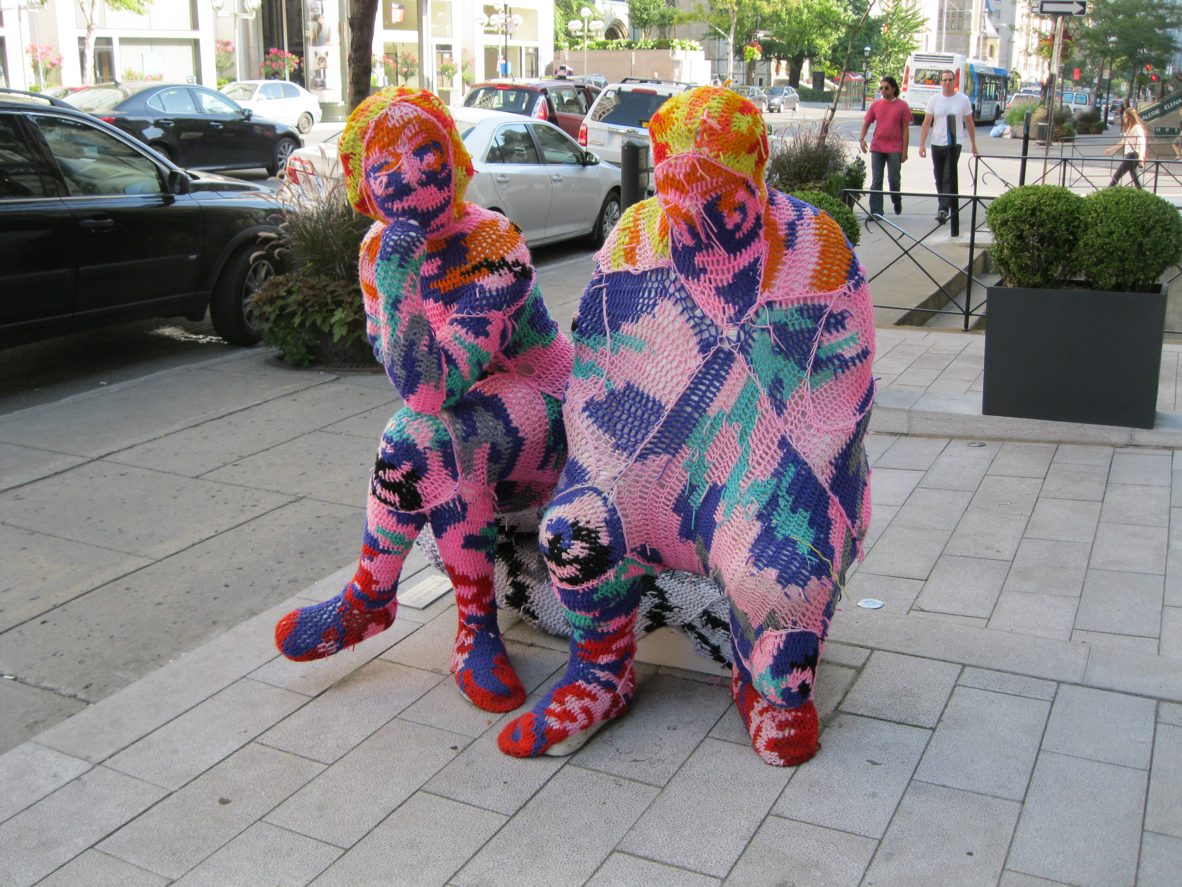 Devant la galerie NuEdge de la rue Sherbrooke à Montréal, l'artiste d'origine polonaise Olek (Agata Oleksiak) a crocheté une oeuvre sur une sculpture existante. Son art consiste à ajouter une seconde peau, très colorée; ce qui modifie radicalement l'apparence de l'objet. Montreal Gazette